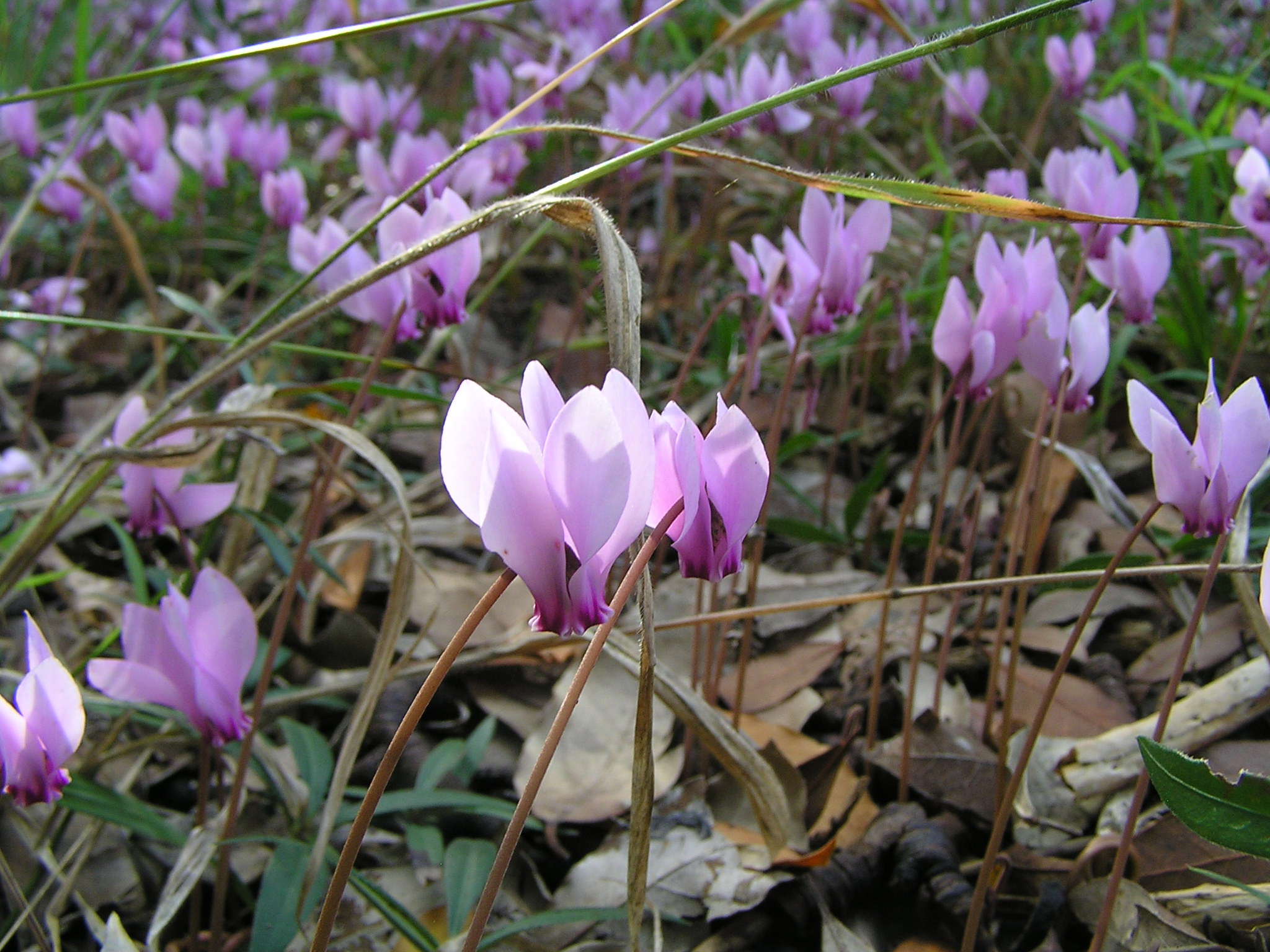 Cyclamens